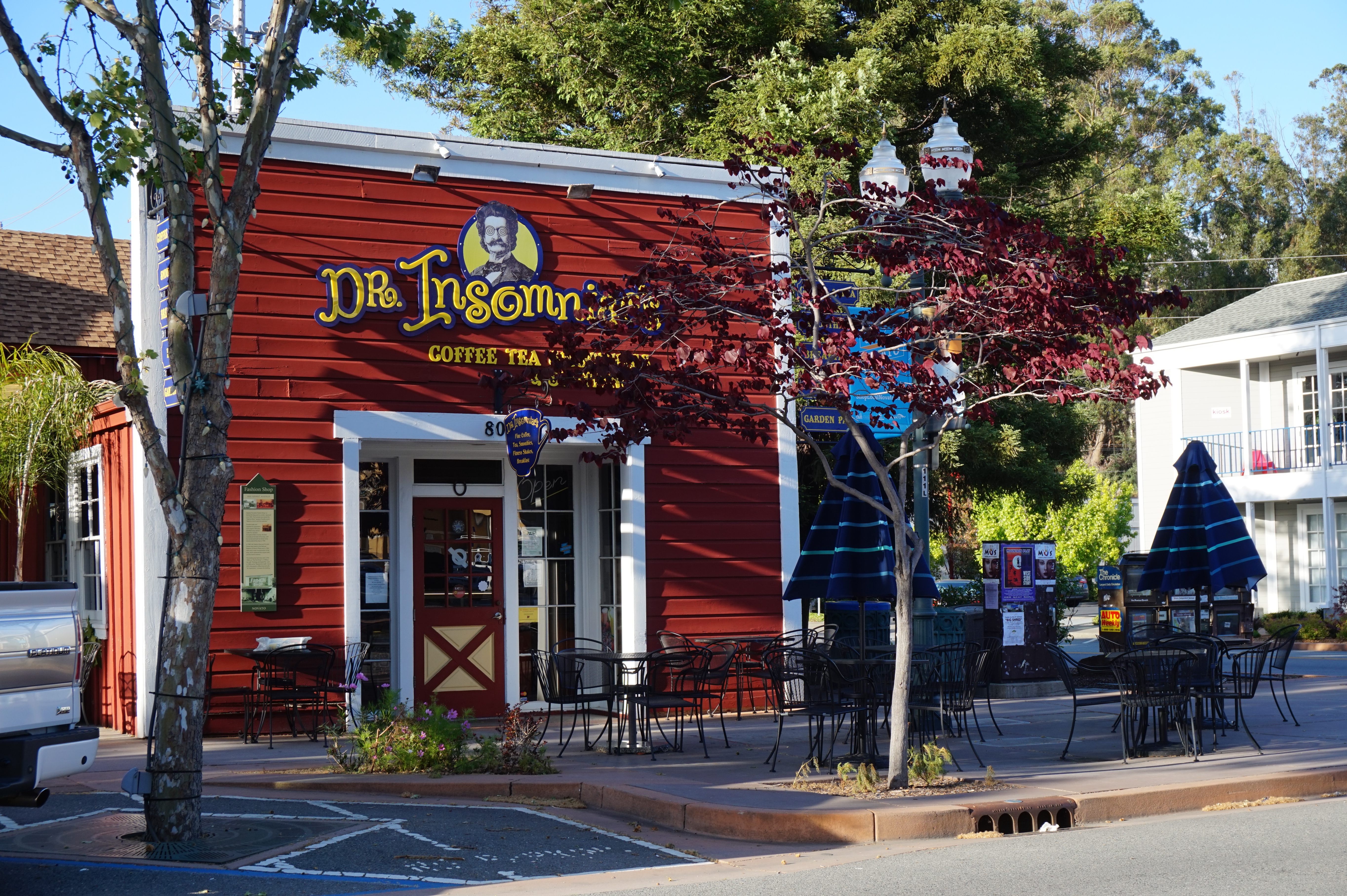 Кафетерий в центре, Новато